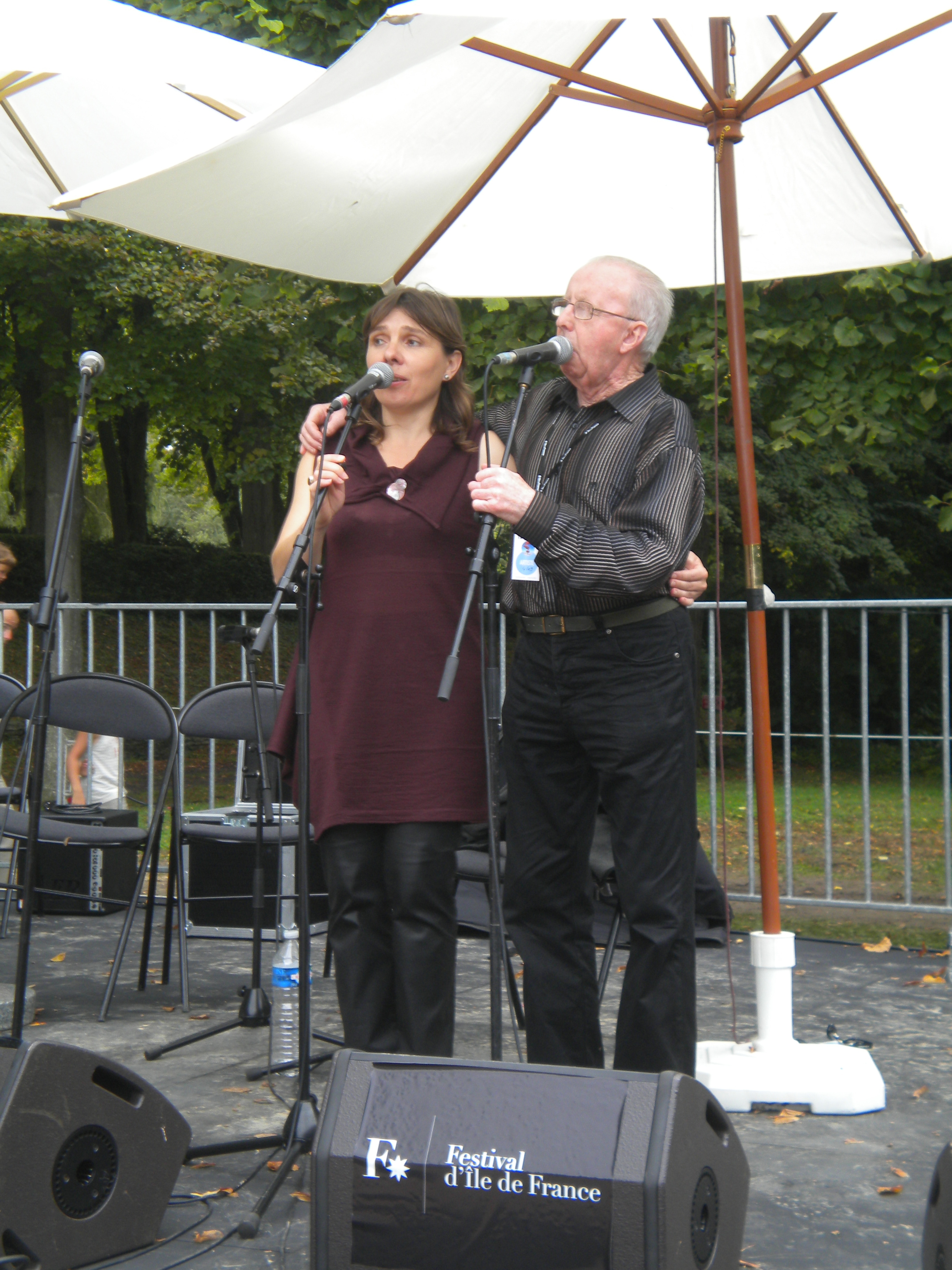 Annie Ebrel Marsel Gwilhou